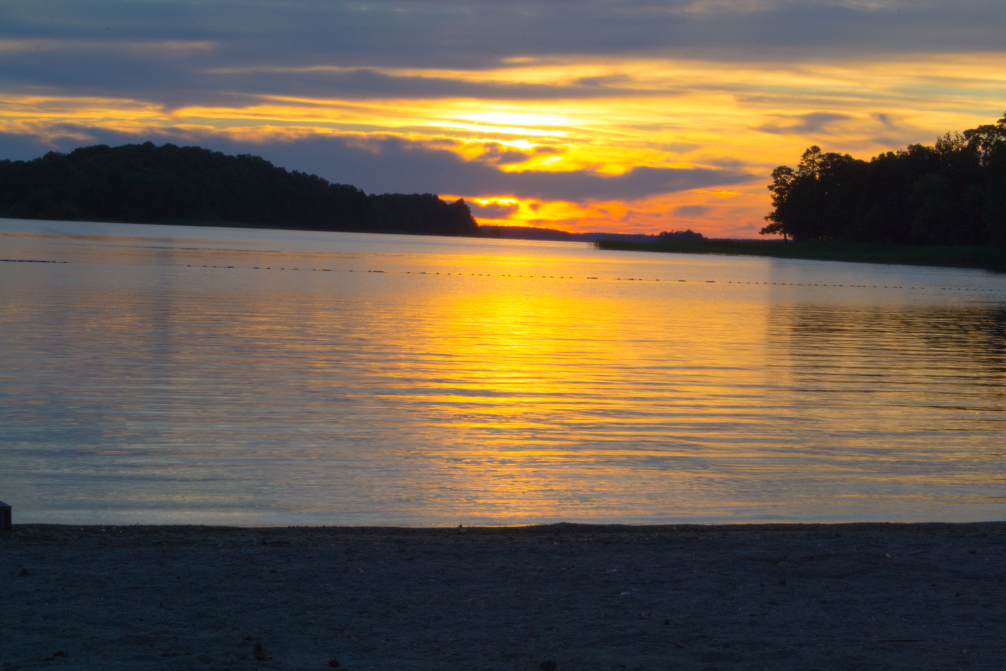 Solnedgång över Sundbyholms badet